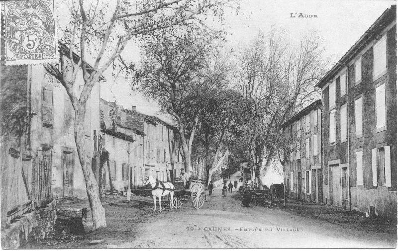 France, Aude (11), Caunes-Minervois